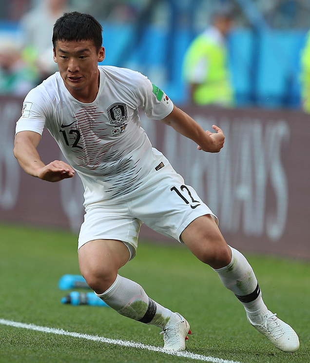 Швеция победила Южную Корею в матче ЧМ-2018